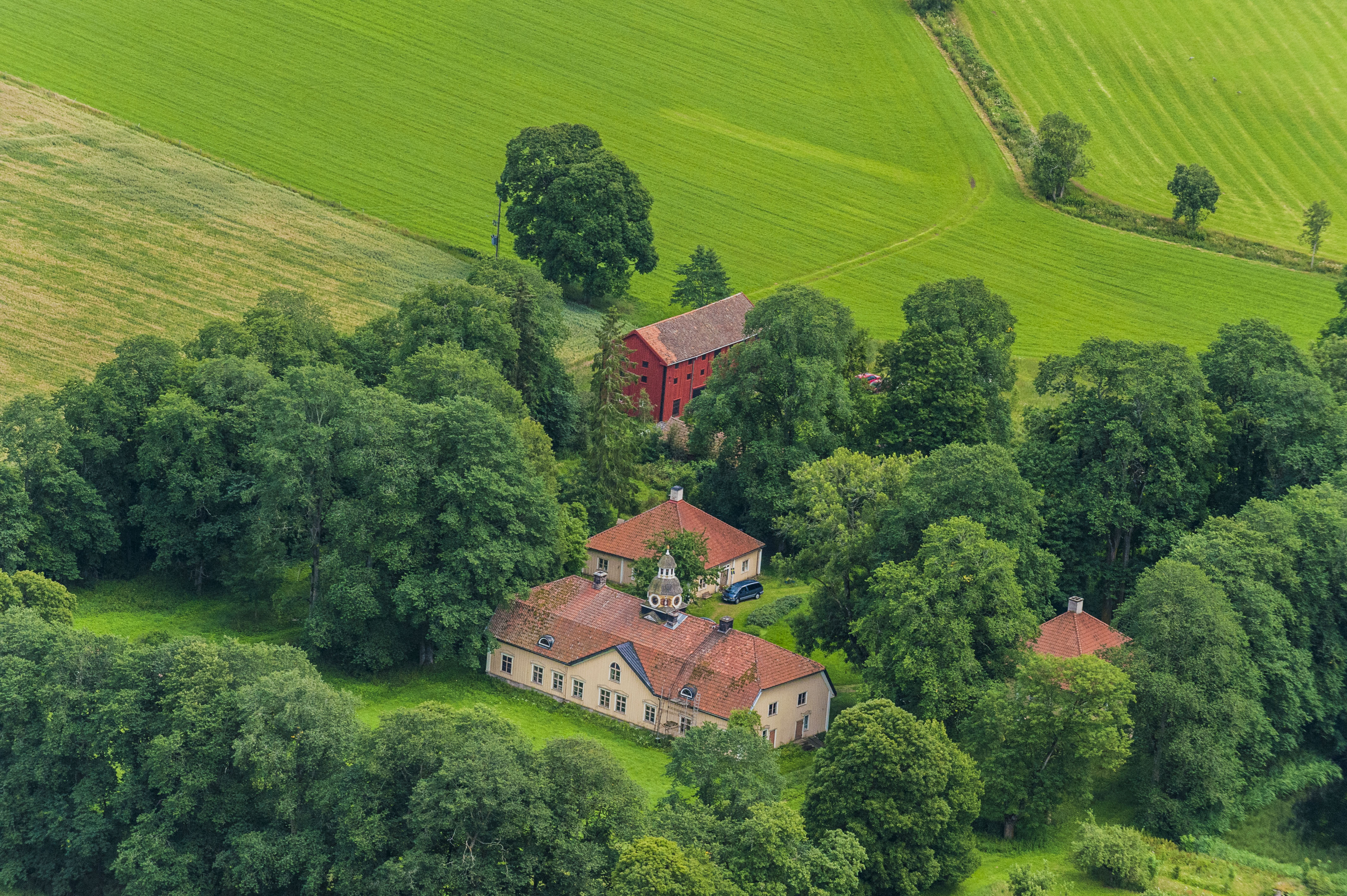 Göberfa herrgård från luften